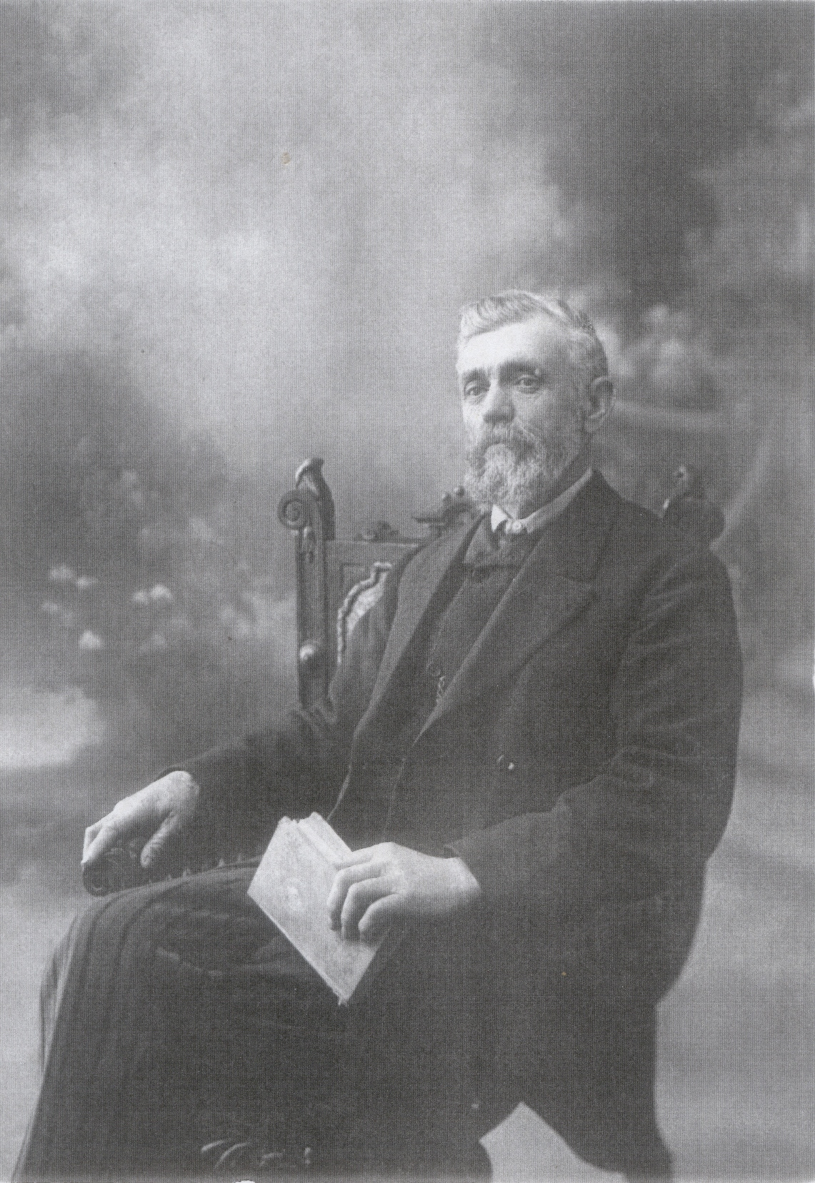 Fotografía de Edward Owen, "Maes Llaned", pionero galés en la Patagonia Argentina